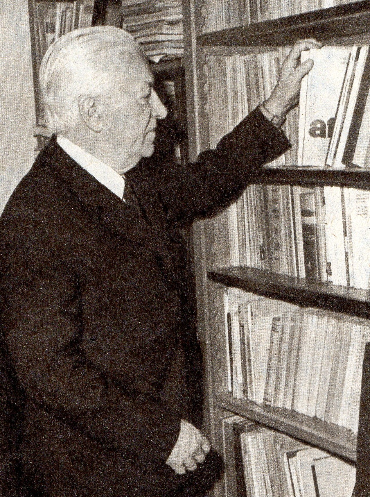 Stanisłąw Leszczycki - polski geograf.